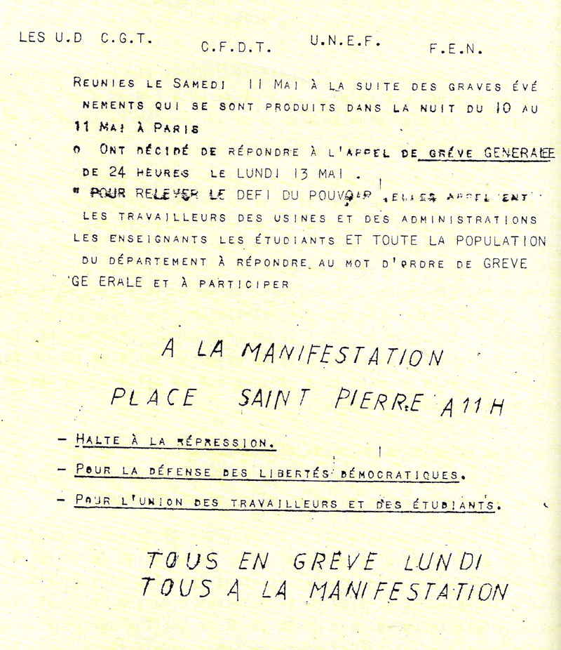 tract d'appel de l'intersyndicale à la manifestation du 13 mai 1968 à Caen